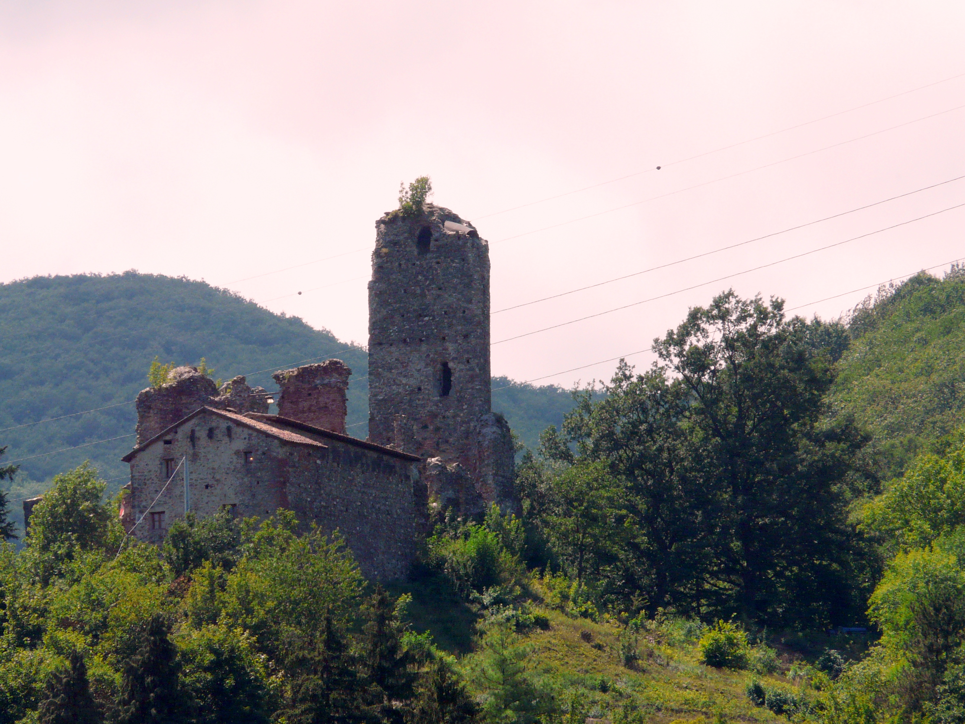 Vista del castello di Borgo Fornari dall'autostrada A7 Milano-Genova, Ronco Scrivia, Liguria, Italia